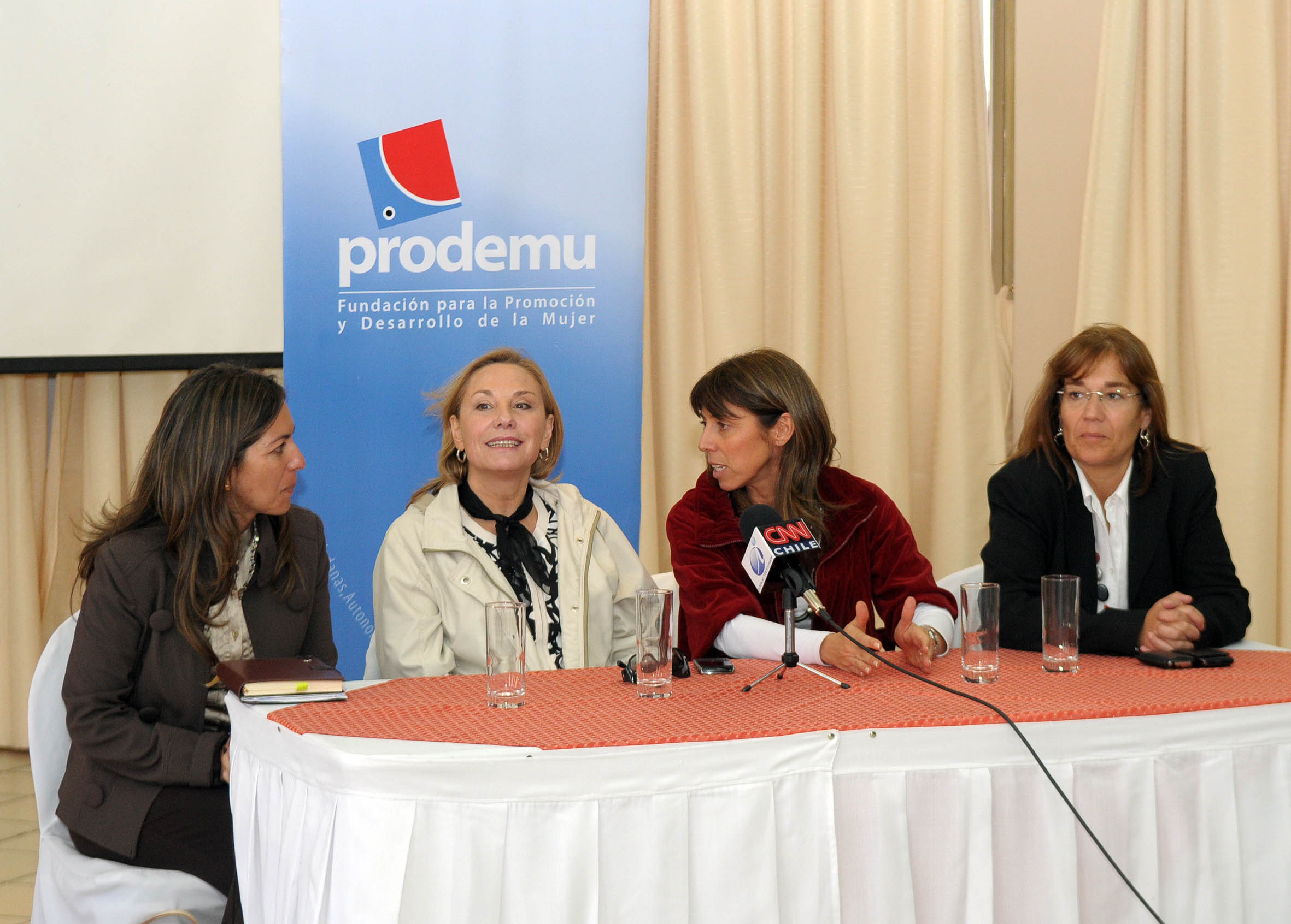 Reunión directoras regioanles Prodemu